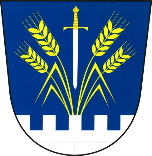 znak, Velké Všelisy, okres Mladá Boleslav